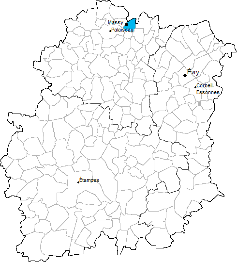 Carte de situation du canton de Massy-Est en Essonne (91)